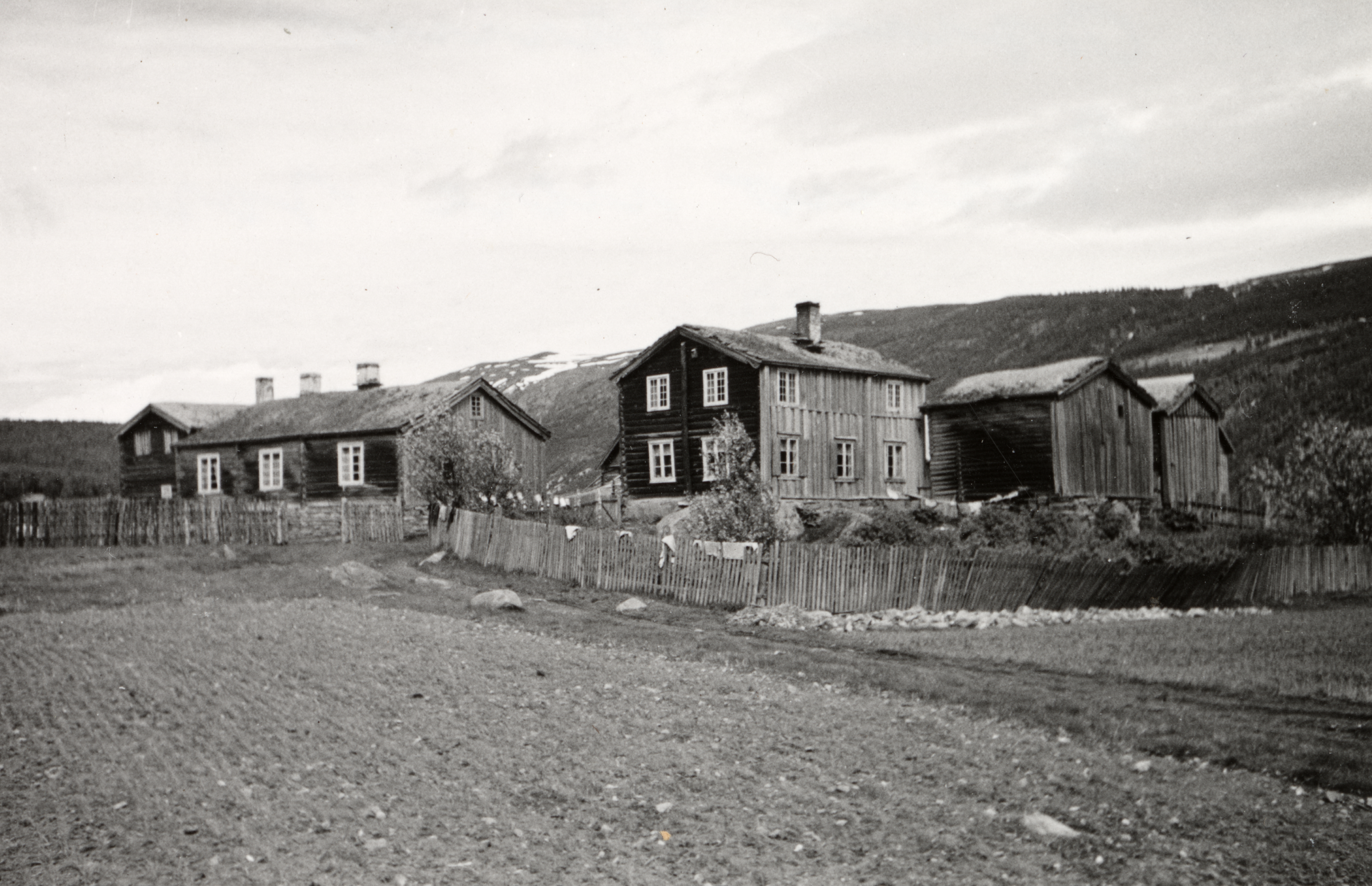 Garmo Sygard i Lom, Oppland